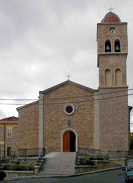 Parrocchiale San Michele Arcangelo